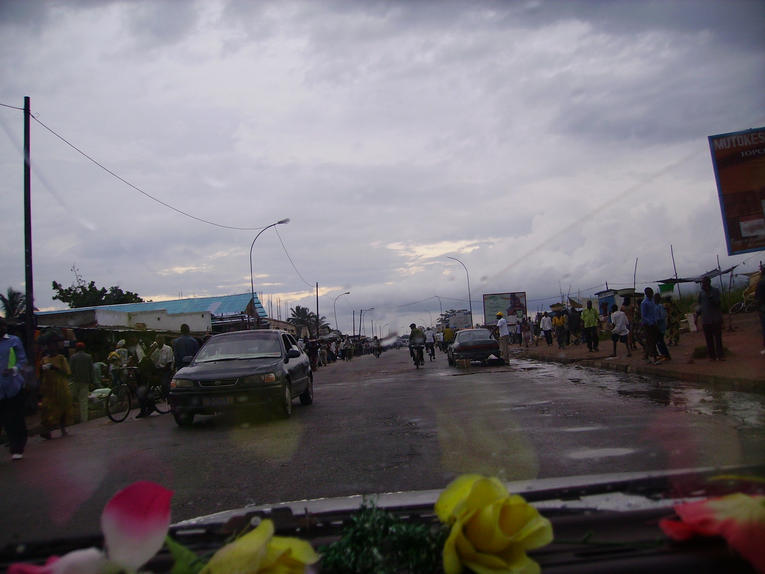 Avenue à Kananga